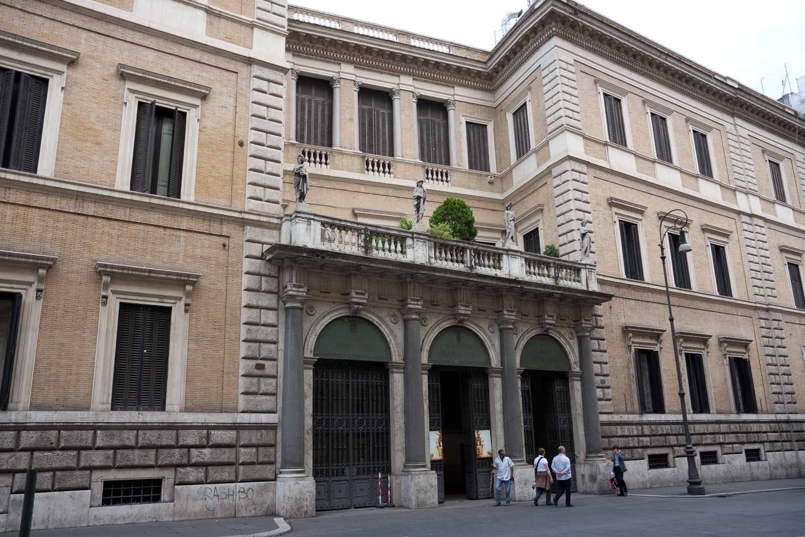 Rione V Ponte, 00186 Roma, Italy